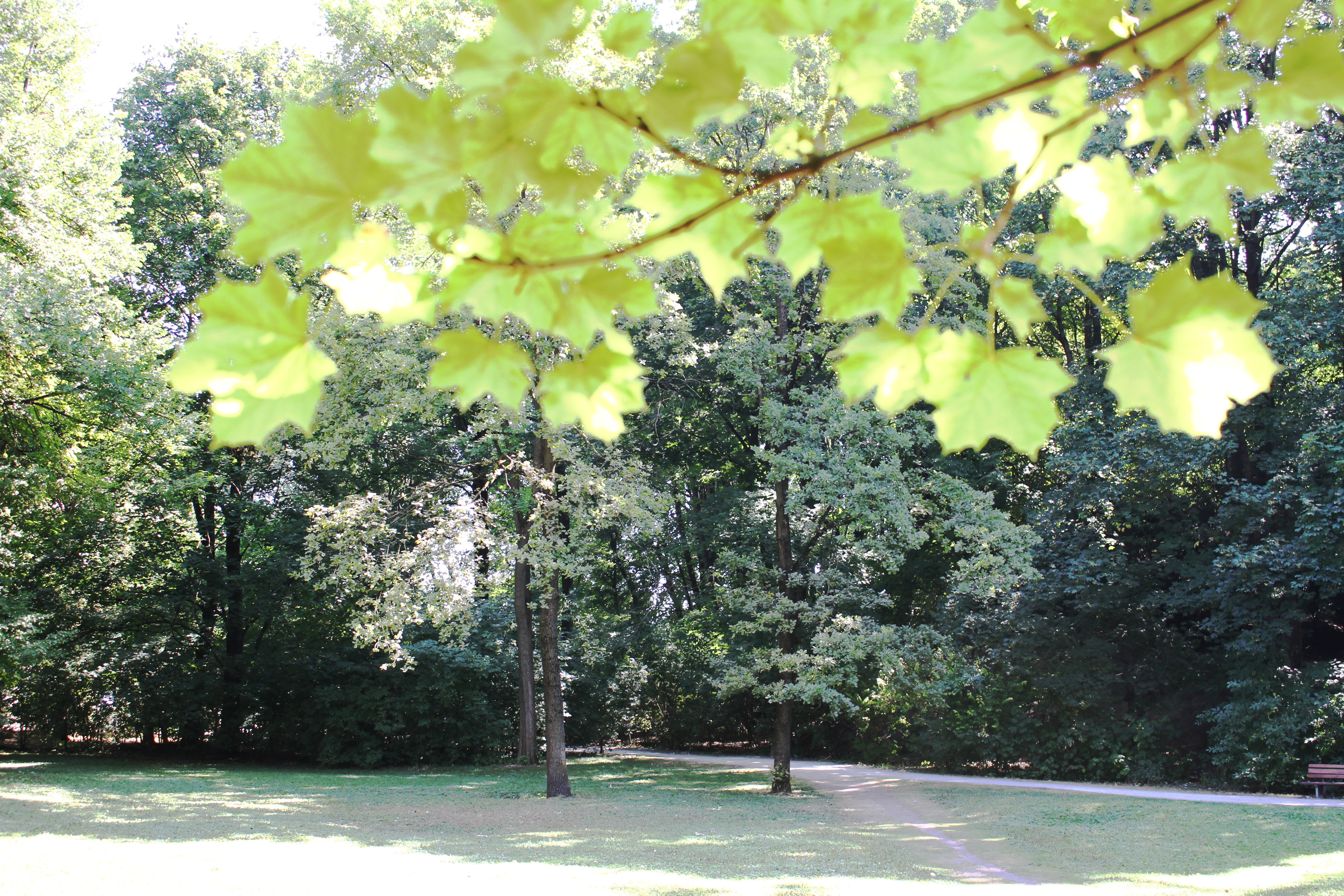 Finanzgarten, München, Germany